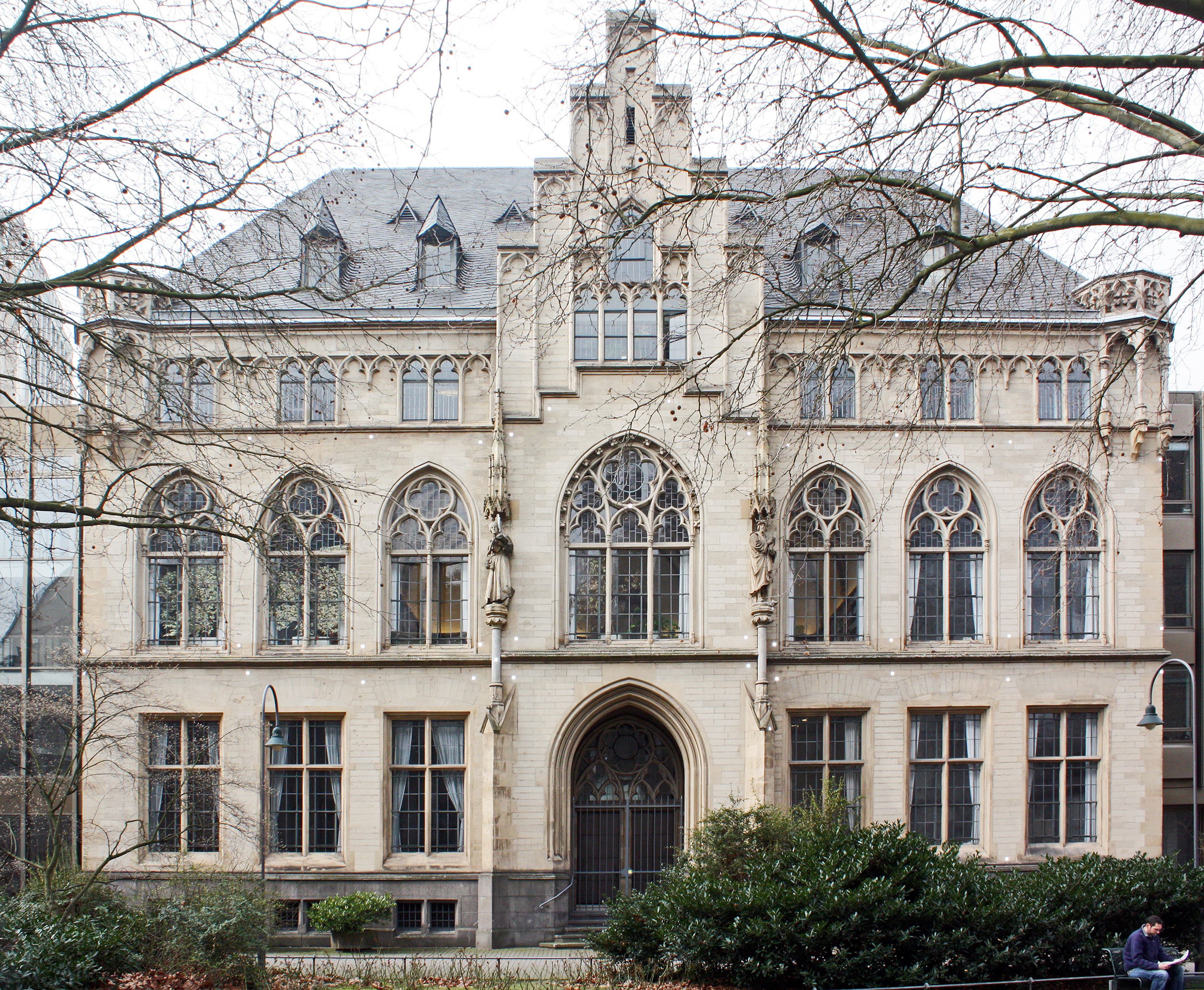 Köln, Gereonskloster. Ehemaliges Stadtarchiv. Erbaut nach Plänen des Stadtbaurates Friedrich Carl Heimann im Jahr 1897